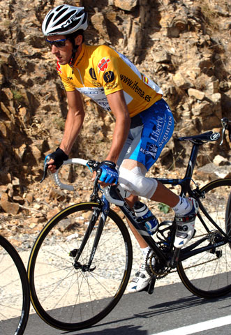 Roberto Heras in de leiderstrui van de Ronde van Spanje.